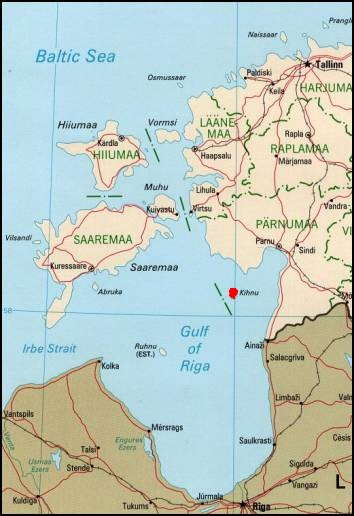 Estonian archipelago (Kihnu)